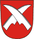 znak obce